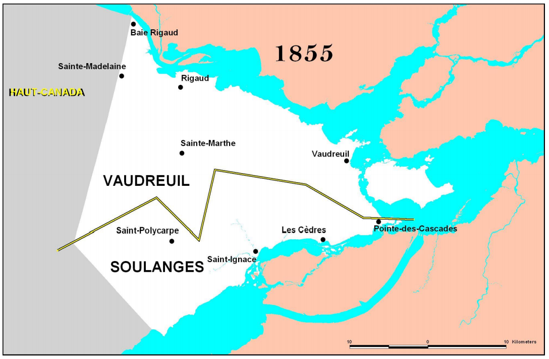 1855 - Vaudreuil-Soulanges